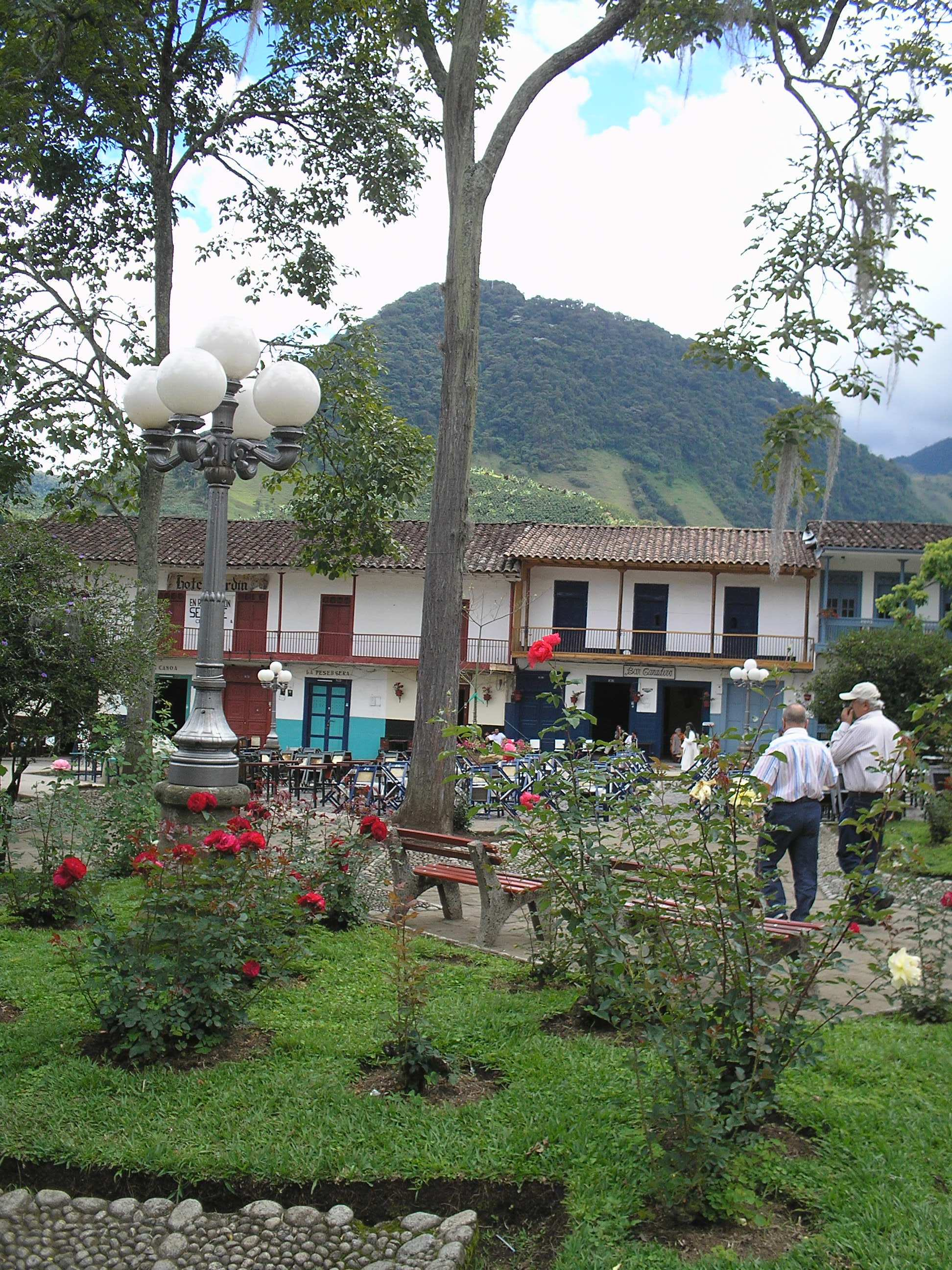 Parque principal del municipio de Jardín, Antioquia, Colombia